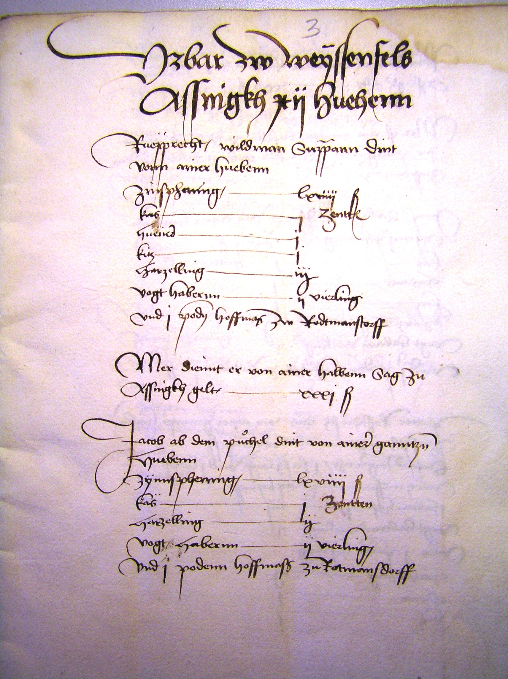 Urbar gospostva Bela peč za naselje Jesenice, 1498